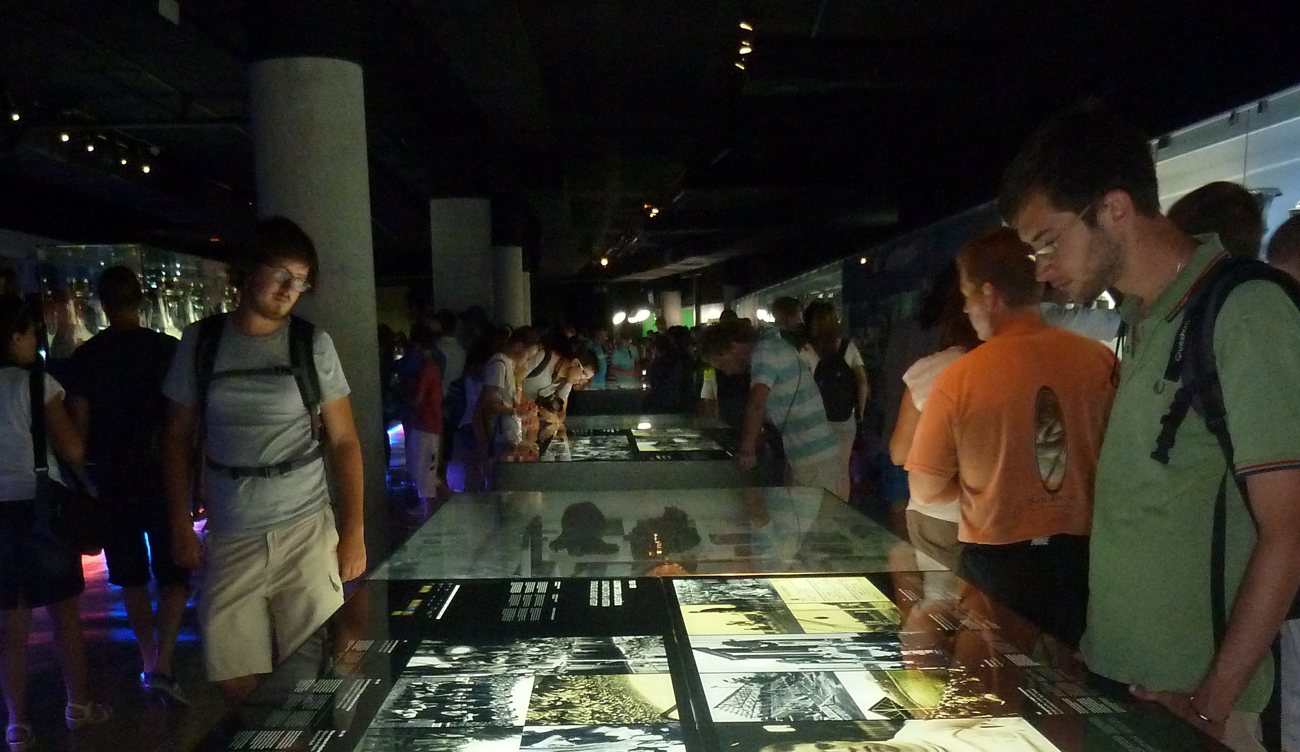 Vista del museo del FC Barcelona, situado en el estadio Camp Nou.